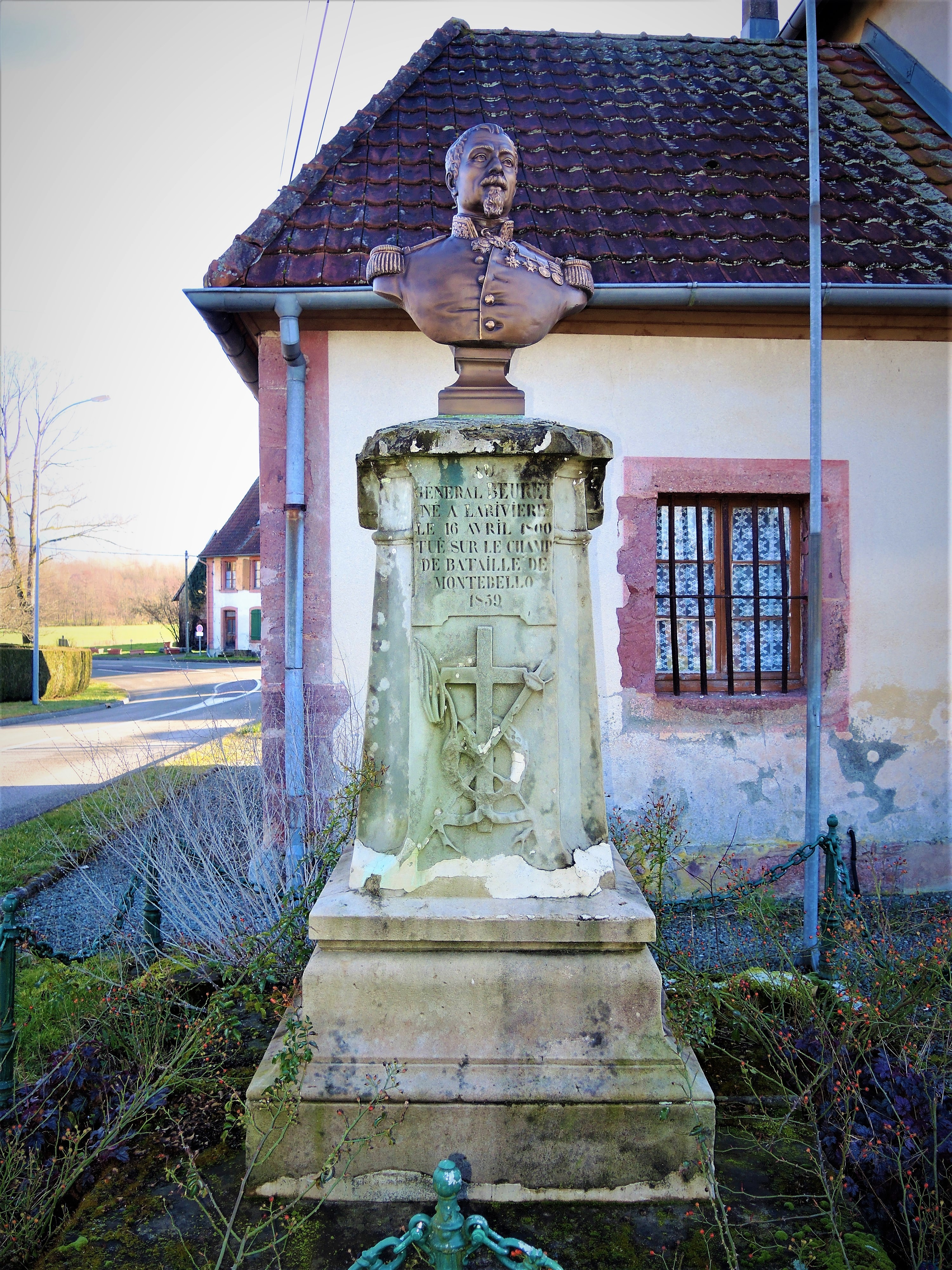 Mémorial du général Beuret. Larivière. Territoire de Belfort